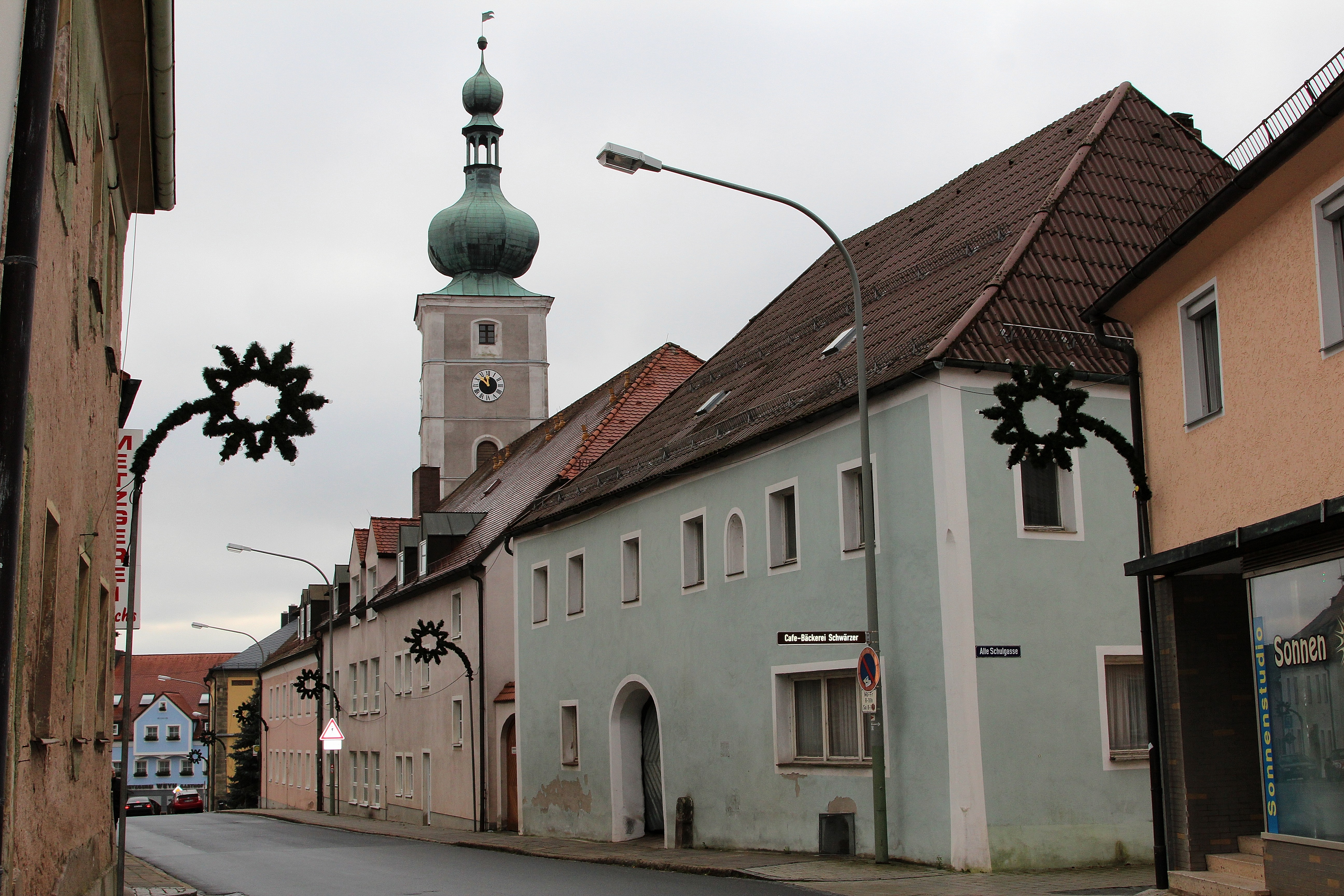 Pressath, Hauptstraße 19 (im Hintergrund Katholische Pfarrkirche St. Georg), ehemaliger Gasthof, zweigeschossiger Walmdachbau mit Korbbogentor und Mauernische: Landkreis Neustadt an der Waldnaabt, Oberpfalz, Bayern (2015)